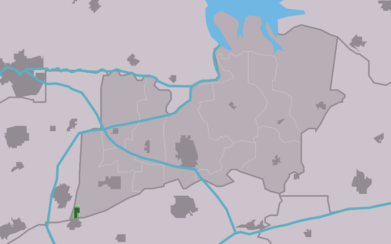 Kaartsje fan himrik fan Sweacherbosk